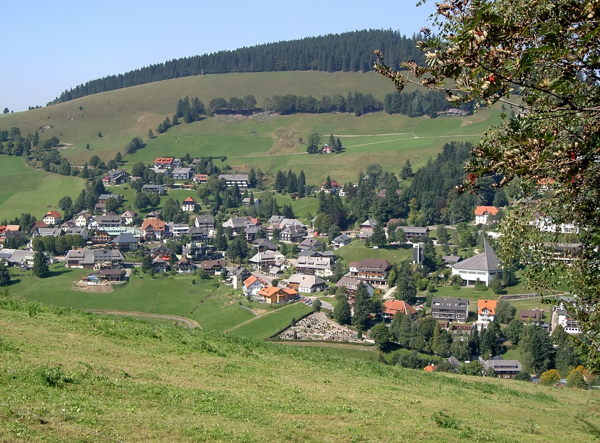 Todtnauberg